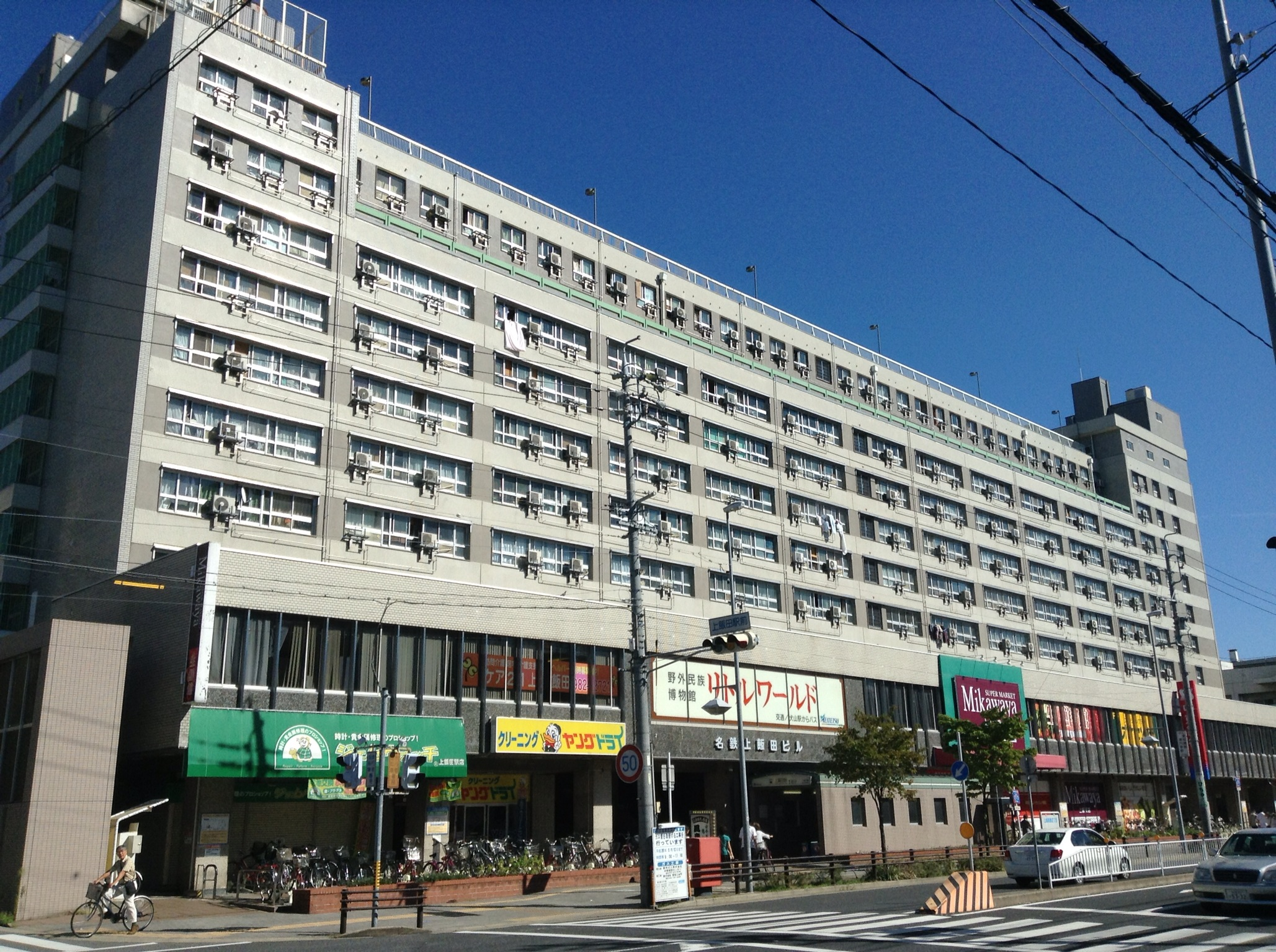 名古屋市北区上飯田通2丁目の名鉄上飯田ビルを西側公道の北側より写す